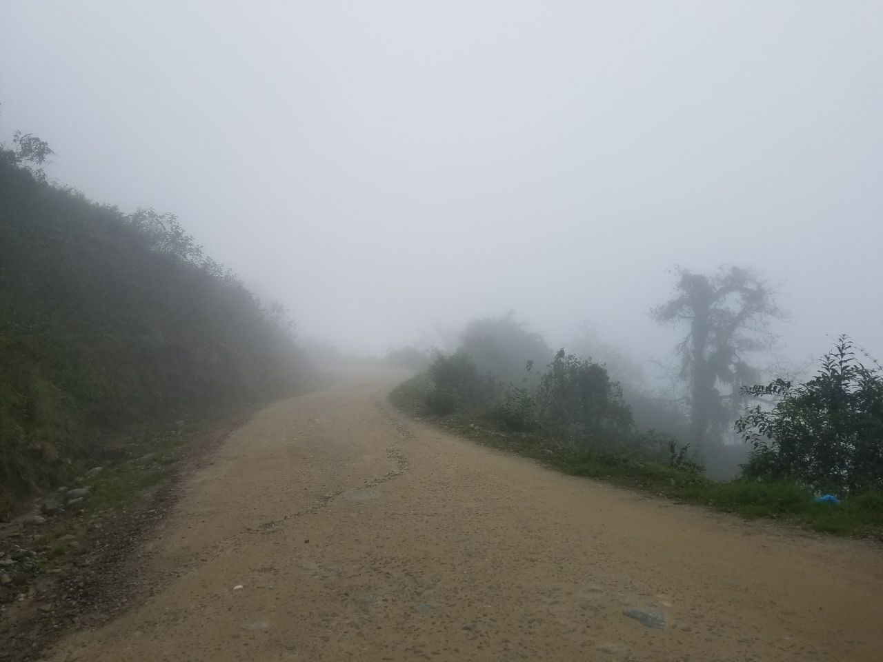 Ruta Nacional 65, provincia de Tucumán, Argentina.